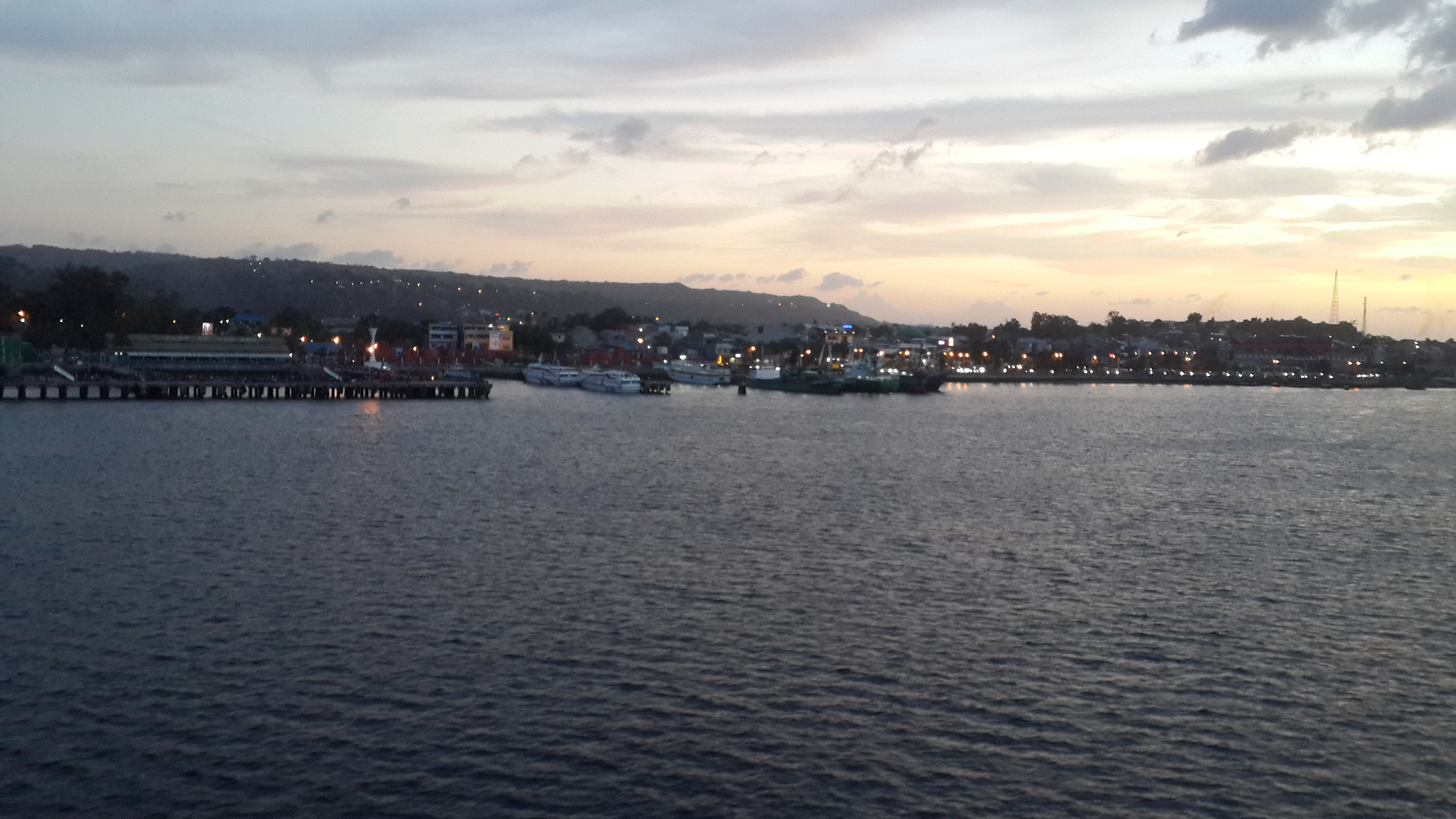 Unnamed Road, Madongka, Lakudo, Kabupaten Buton, Sulawesi Tenggara 93763, Indonesia